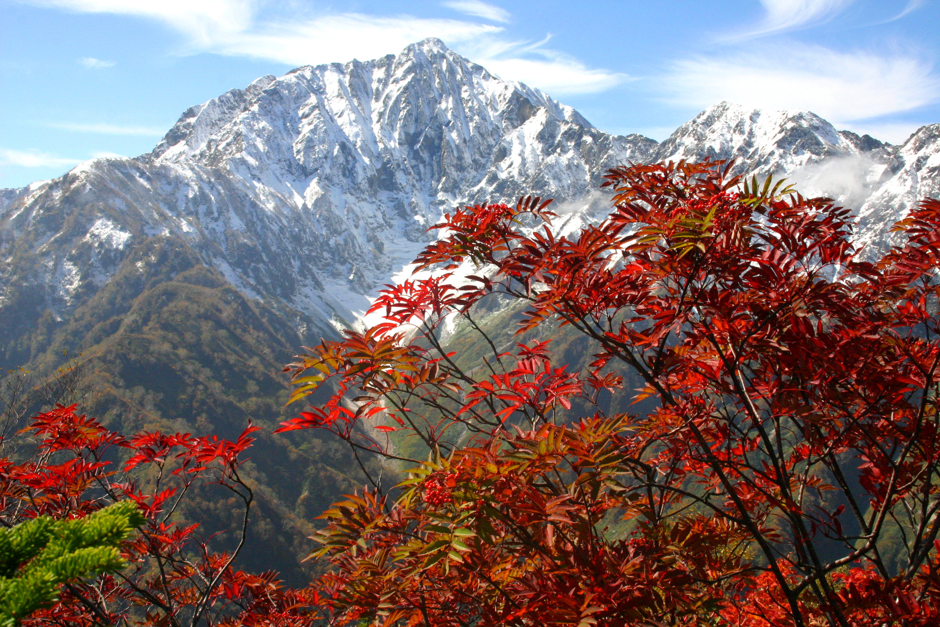 鹿島槍ヶ岳 中遠見より撮影 Sorbus commixta